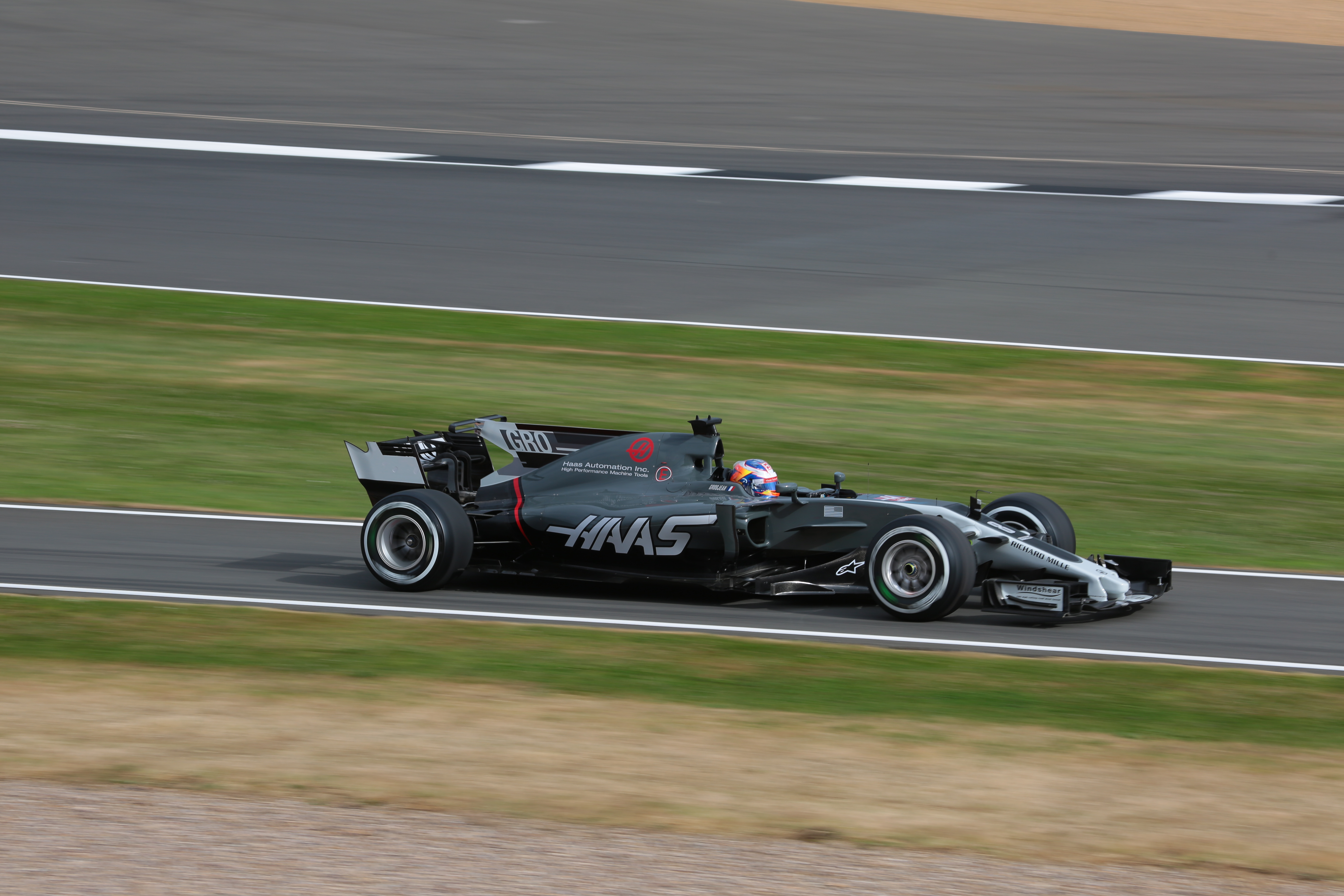 f1